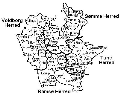 Roskilde Amt before 1808, Denmark. Map by Svend-Erik Christiansen